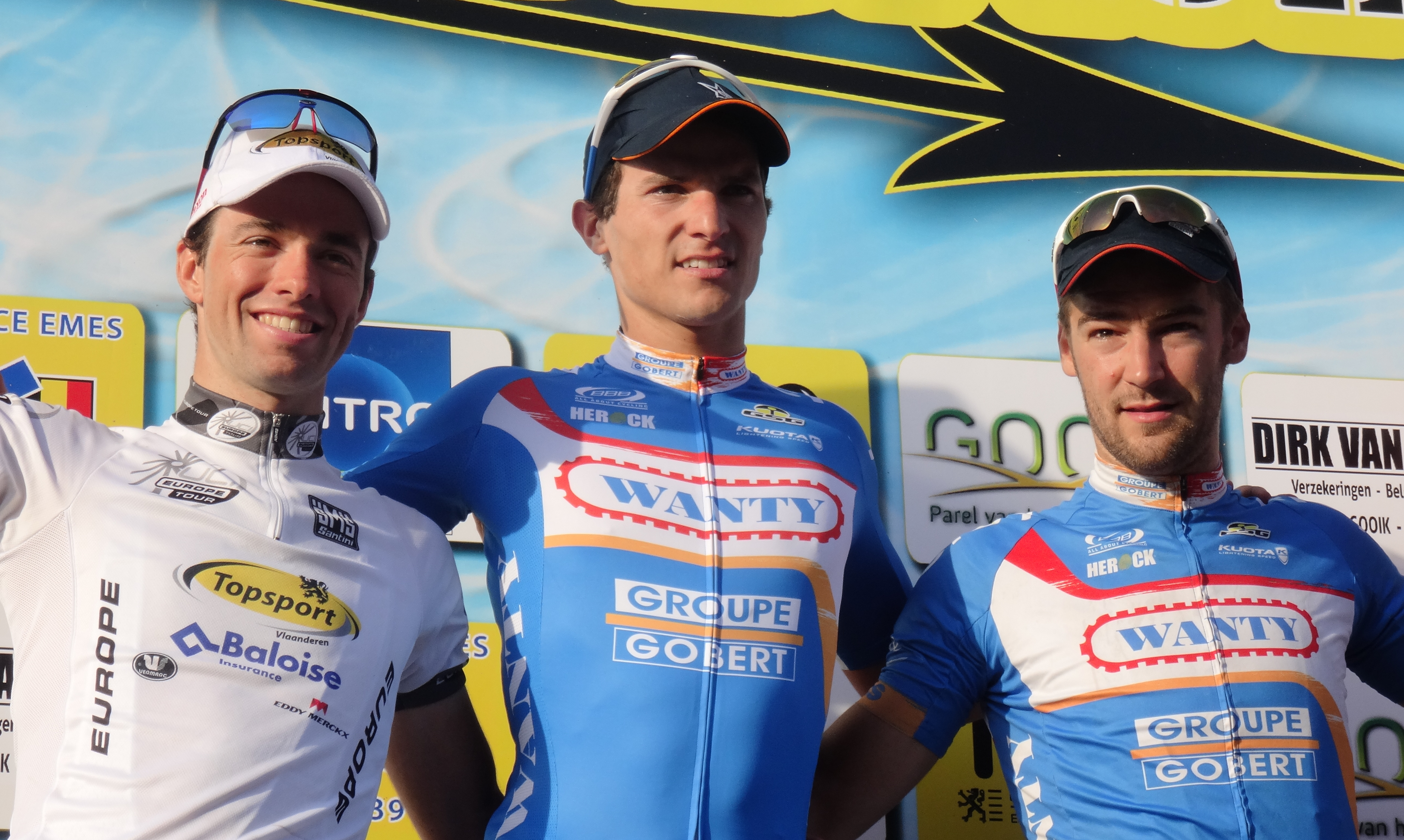 Reportage réalisé le dimanche 28 septembre à l'occasion du départ et de l'arrivée de la Gooikse Pijl 2014 à Gooik, Belgique.